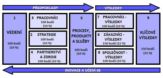 Struktura EFQM Modelu Excelence a hodnocení jednotlivých oblastí